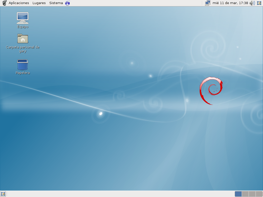 Primera pantalla posterior a la instalación de Debian Lenny.